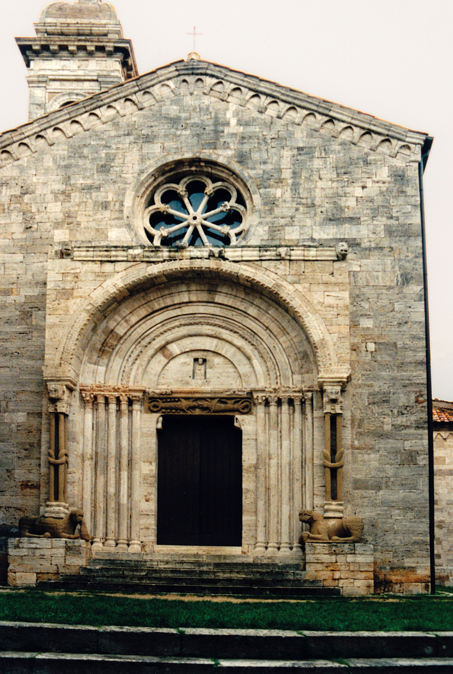 Italie - Toscane - Collégiale de San Quirico d'Orcia